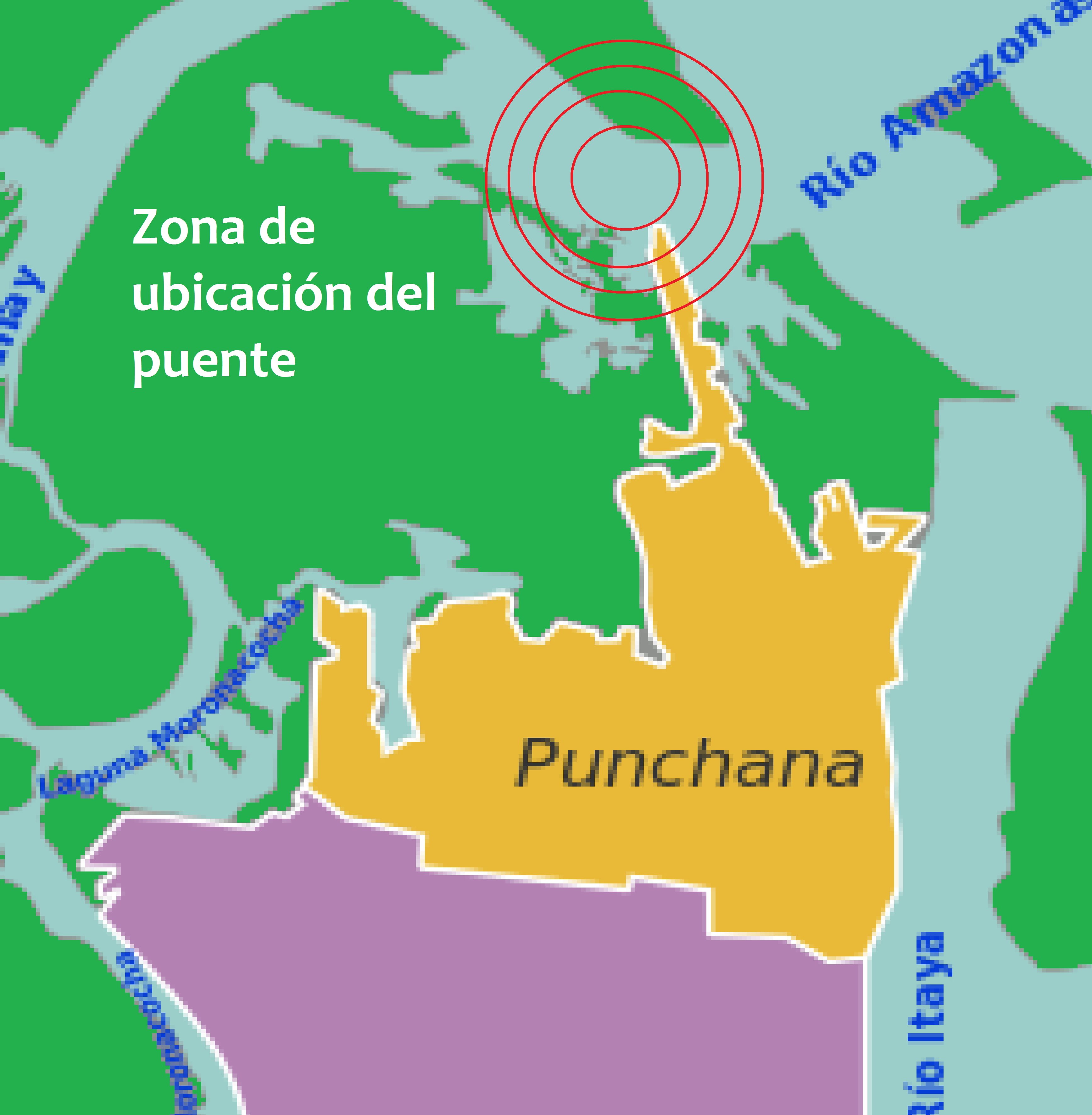 Ubicacion del puente Nanay en Iquitos metropolitano